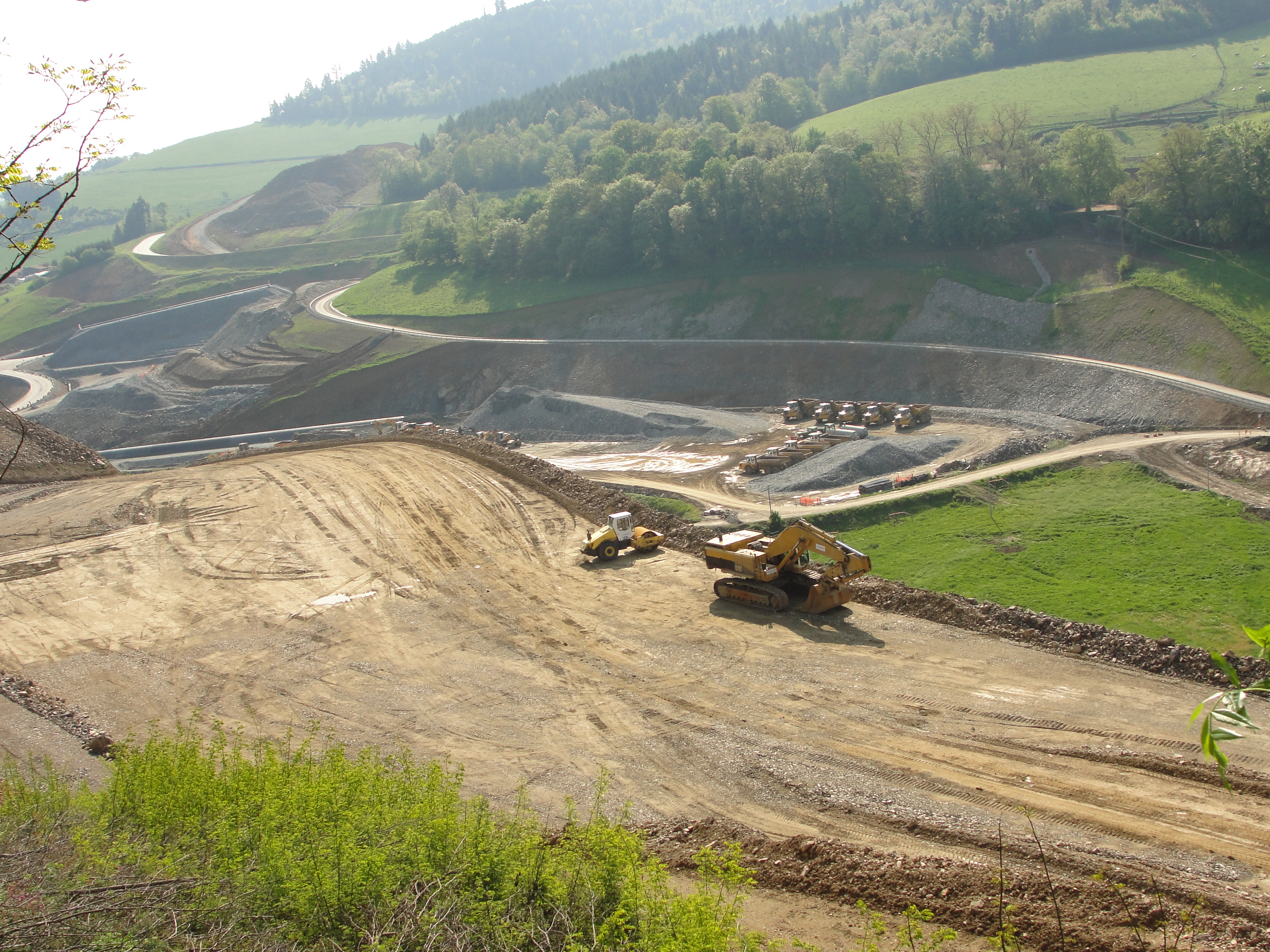 A89 à l'entrée de Tarare (Rhône), vers le château de la Bussière - printemps 2010.